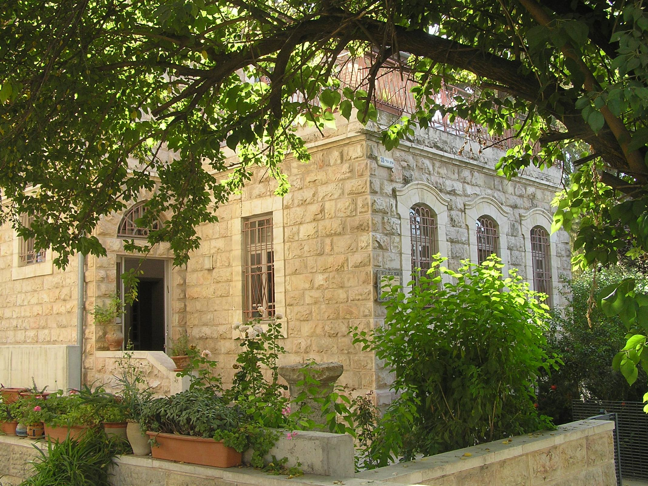 בית אליעזר בן יהודה השני ממוקם ברח' עין גדי 28 בתלפיות, ירושלים. המשפחה החליטה לעבור אליו לאחר מסכת התנכלויות בבית ברחוב אתיופיה 11. אך אליעזר בן יהודה נפטר זמן קצר לפני שהושלם הבית, ורק אלמנתו חמדה עברה להתגורר בו. משמש כיום כמטה ארגון המתנדבים הגרמני "אות הכפרה והשלום", וכאכסניה.